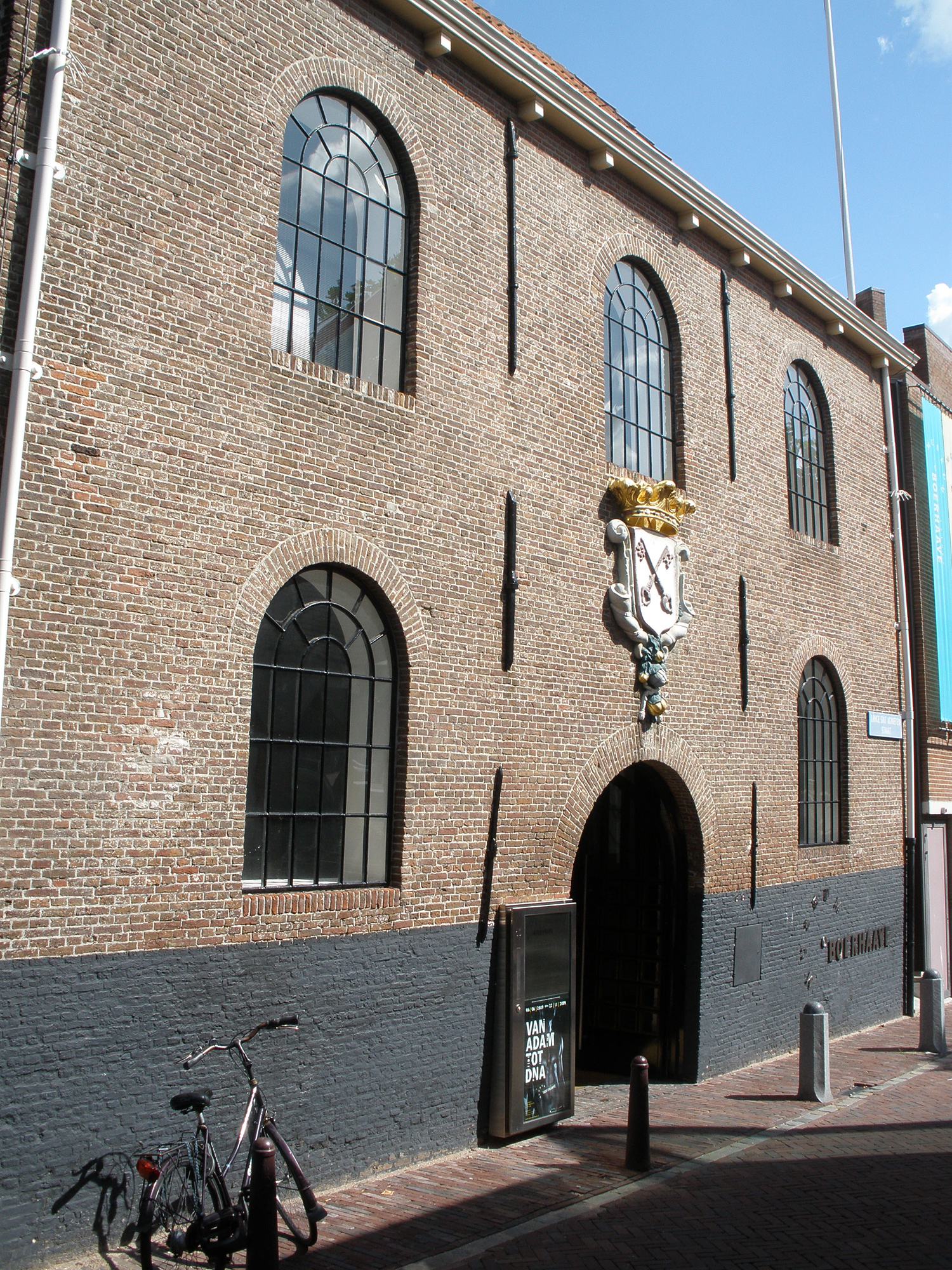 Museum Boerhaave in Leiden, the Netherlands